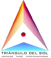 Triángulo del Sol